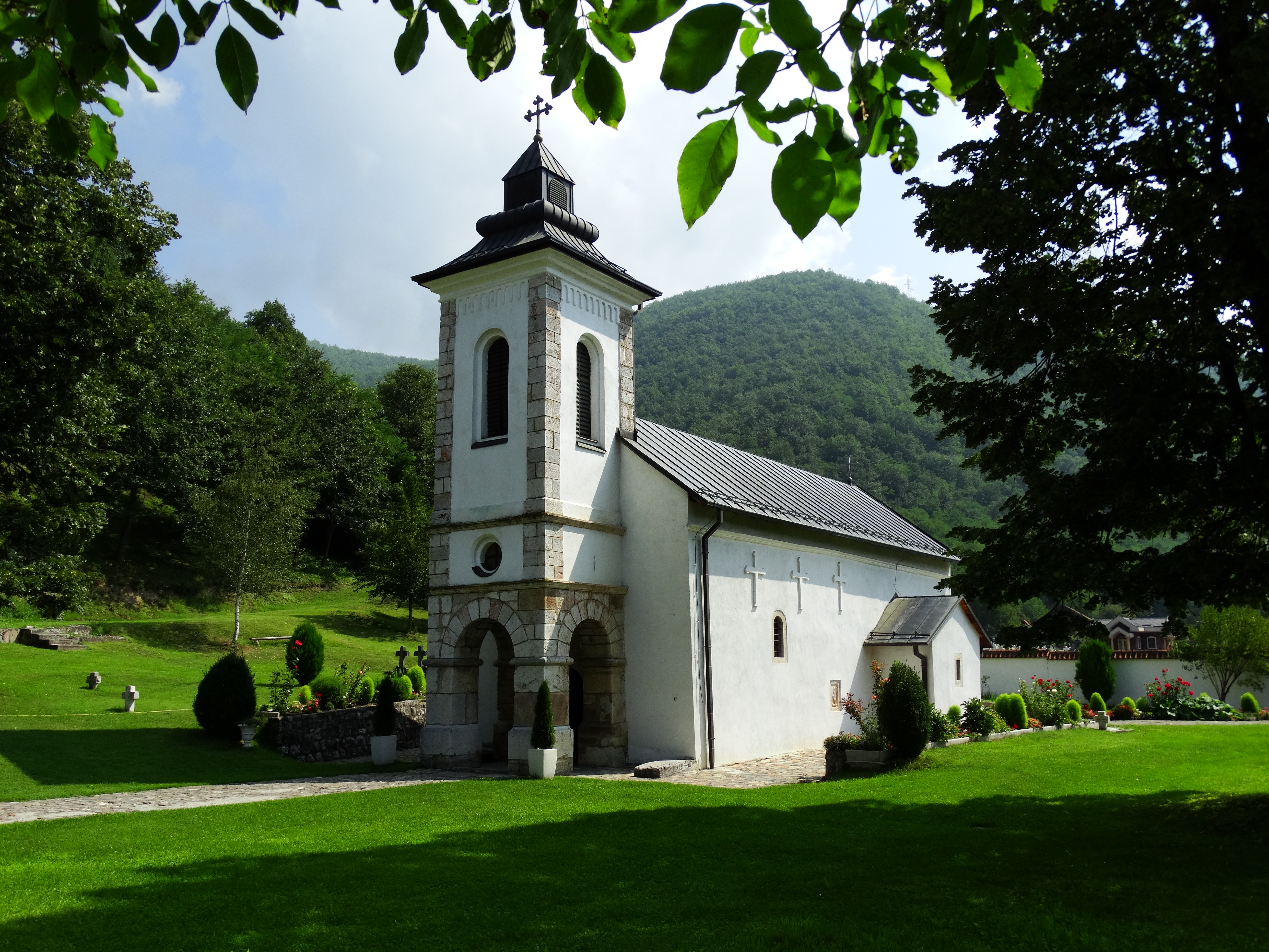 Crkva svetog Georgija - Sopotnica - Novo Goražde